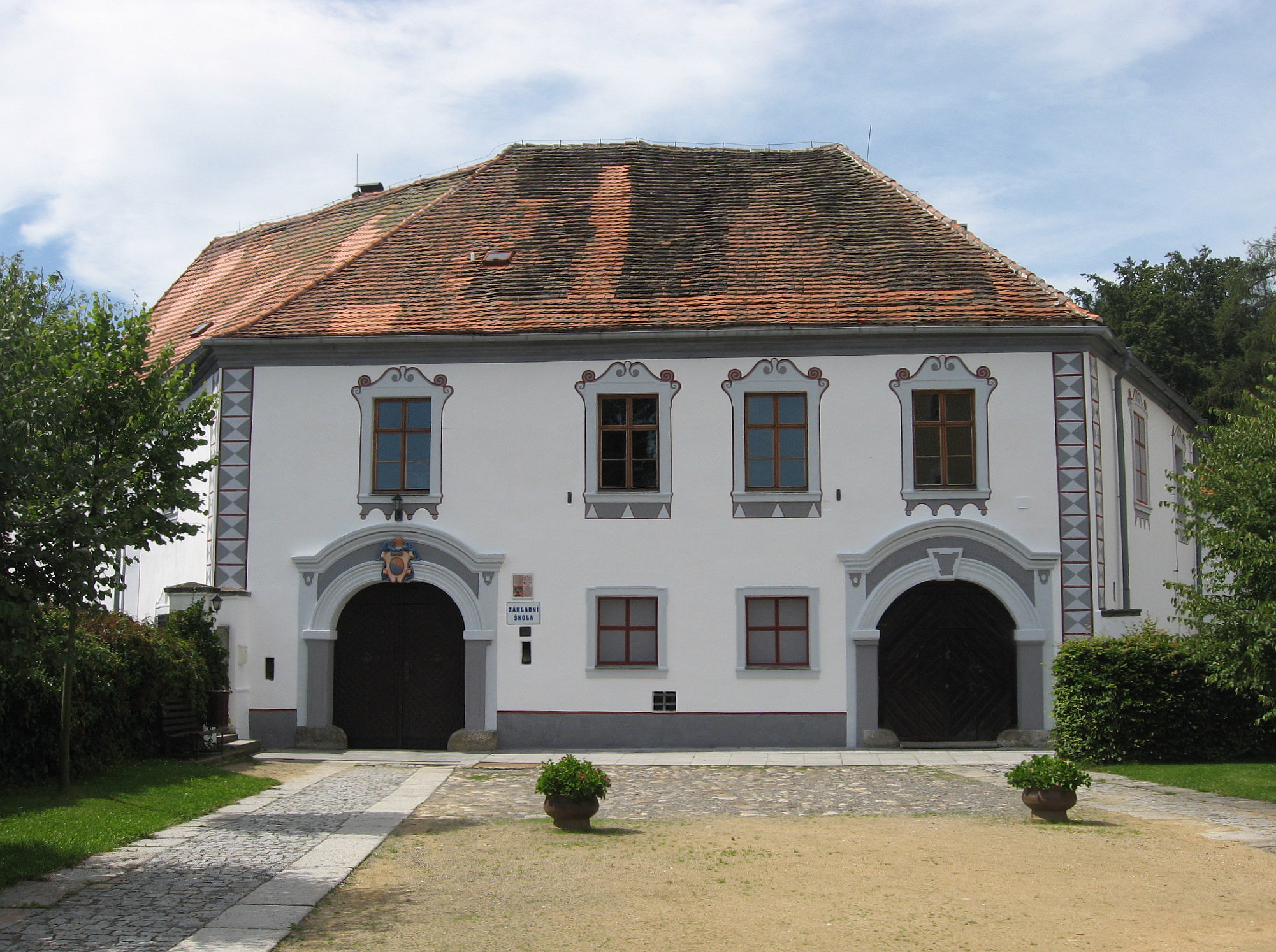 Zámek Chanovice, okr.Klatovy